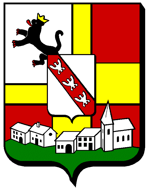 LANEUVEVILLE DEVANT BAYON